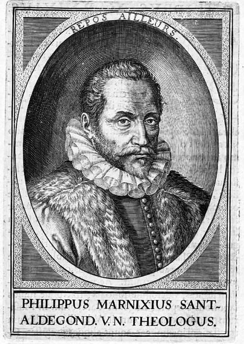 Philip Marnix van St. Aldegonde